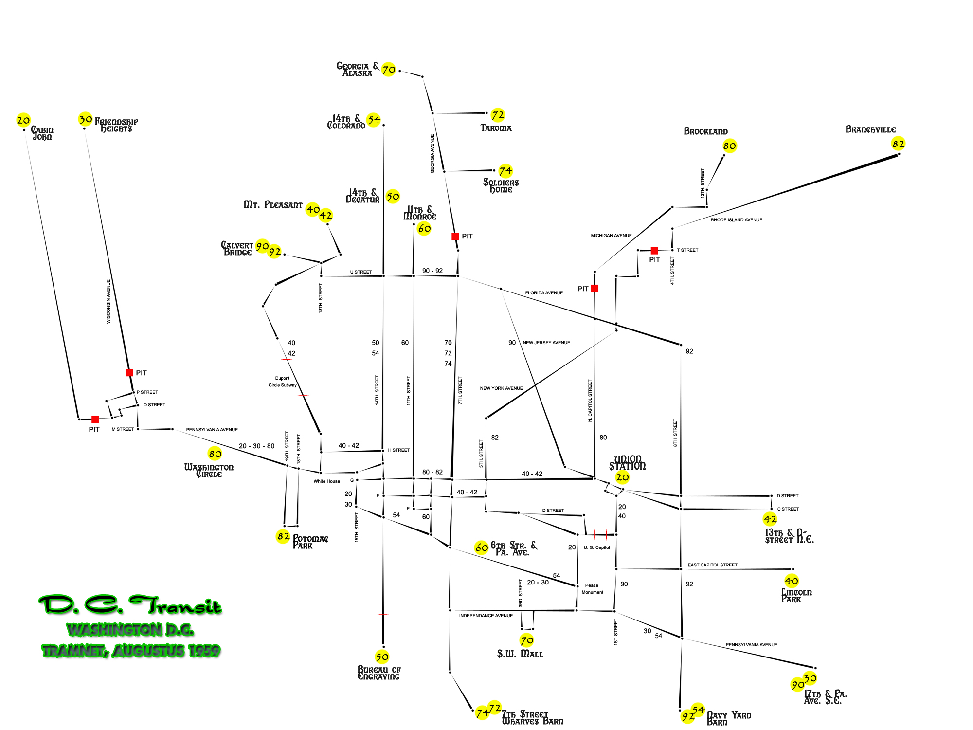 Zelfgetekende media m.b.v. Photoshop CS